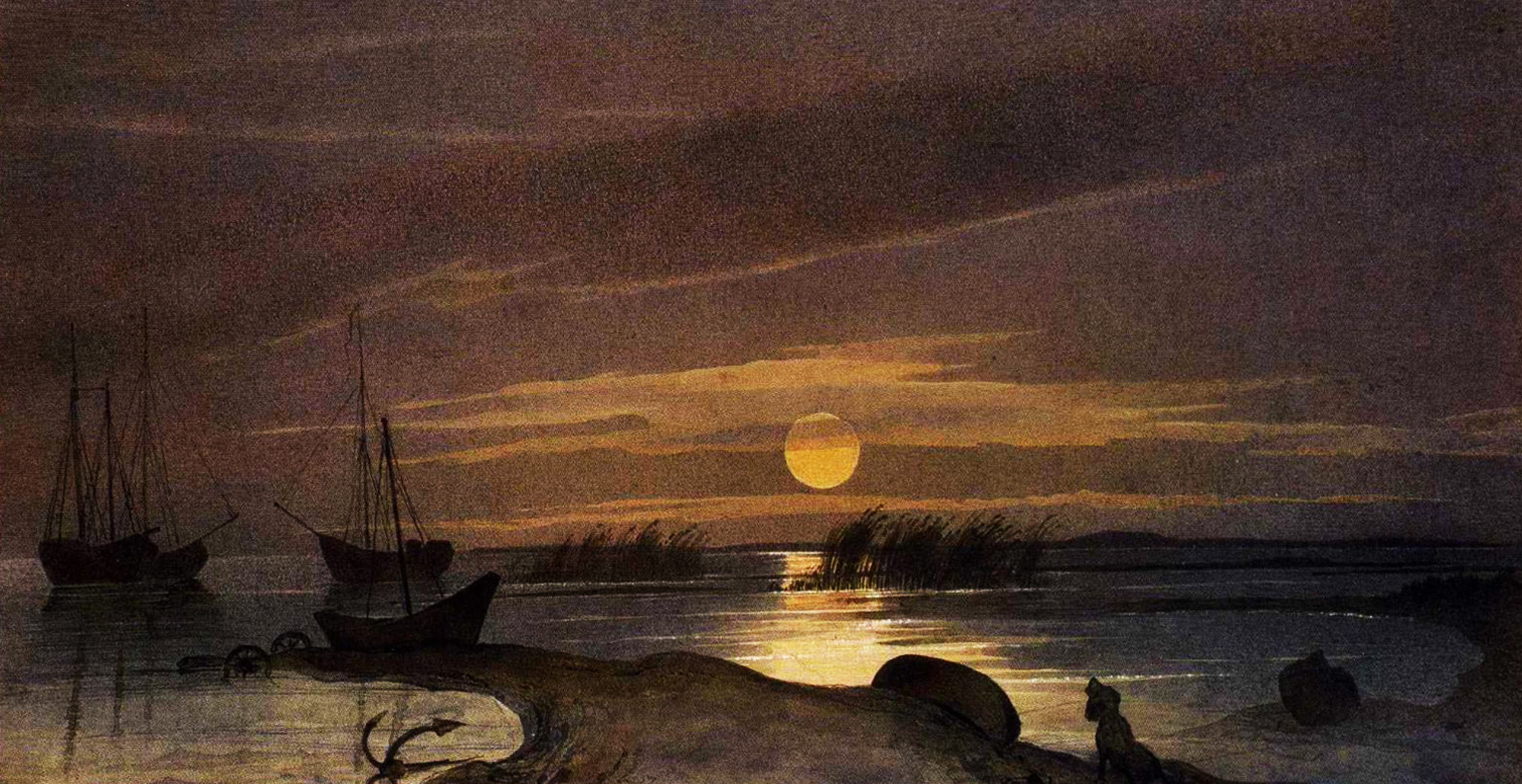 «Місячна ніч на Косаралі» 1848-1849. Папір, акварель. 15×29,2.